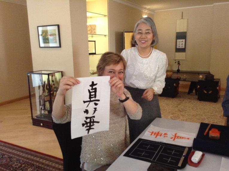 マルグヴェラシヴィリ大統領夫人御参加の書道デモンストレーションとワークショップ （平成２７年１１月２０日）